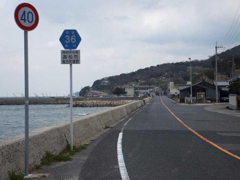 香川県道36号 高松市庵治町鎌野